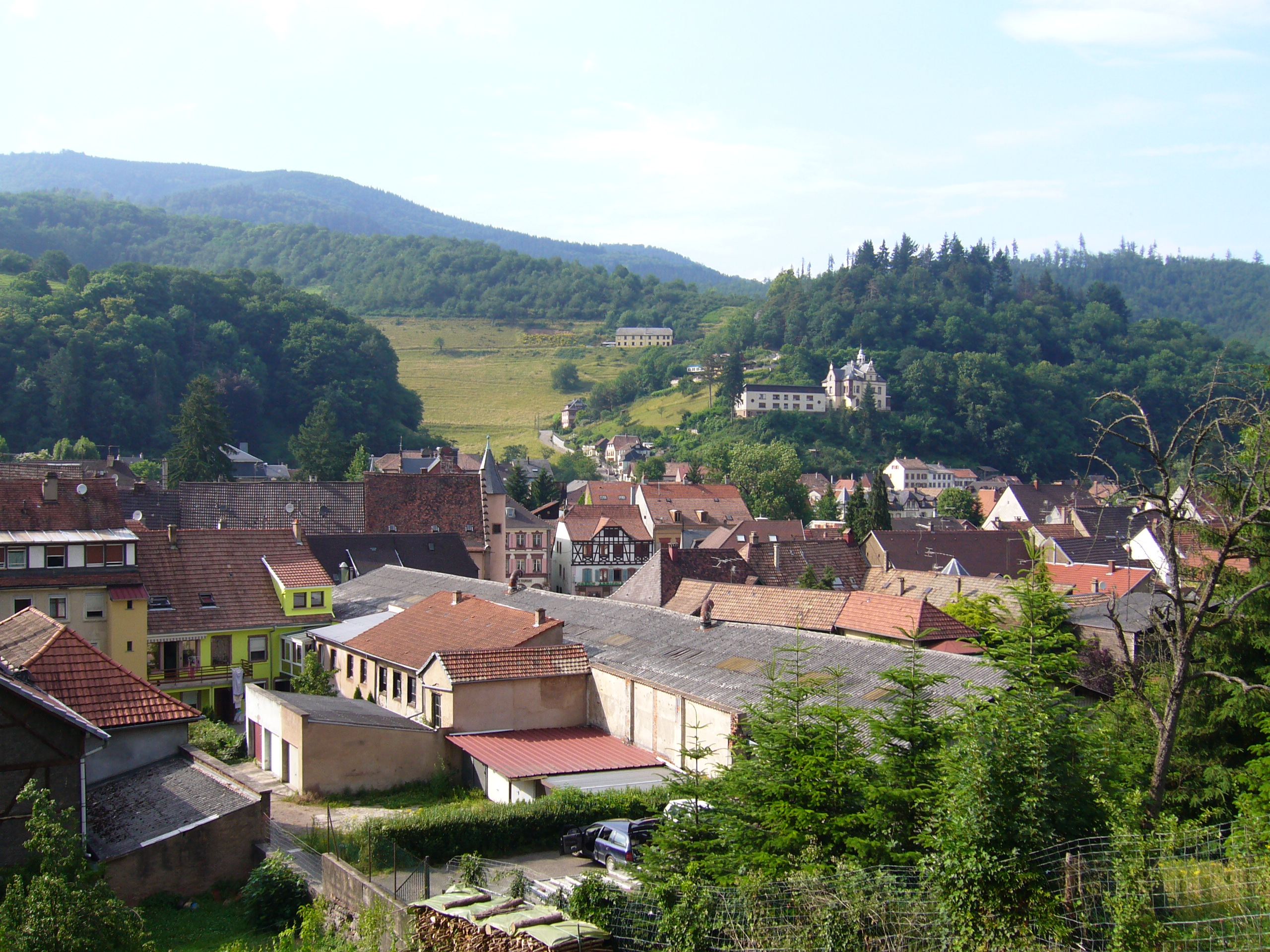 Sainte Marie-aux-Mines depuis les hauteurs de la rue de la liberté